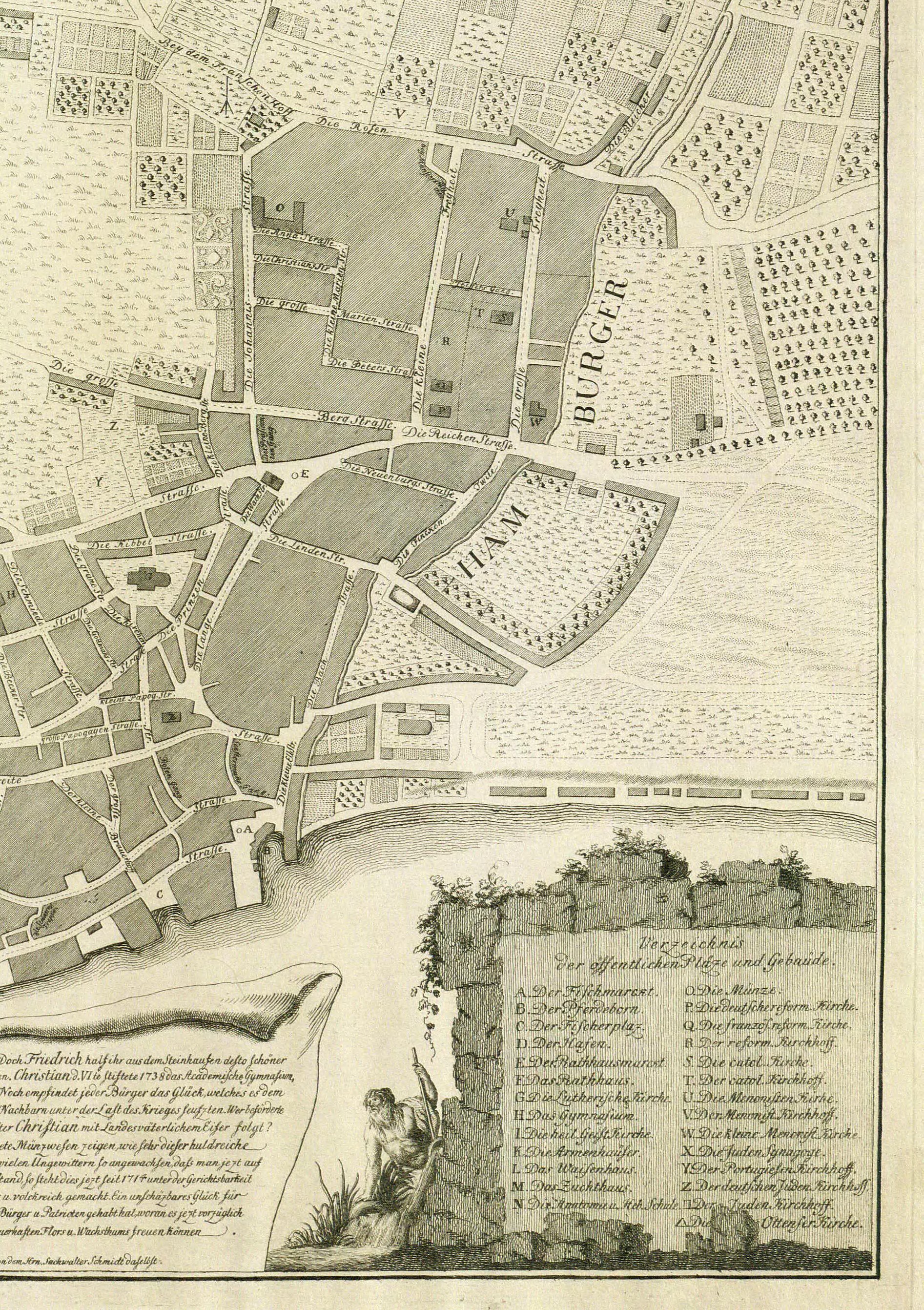 Ausschnitt eines Kupferstiches mit dem Name "Grund Riss der Stadt Altona" von 1770/1773, Verfasser vermutlich J.G.Bremer.